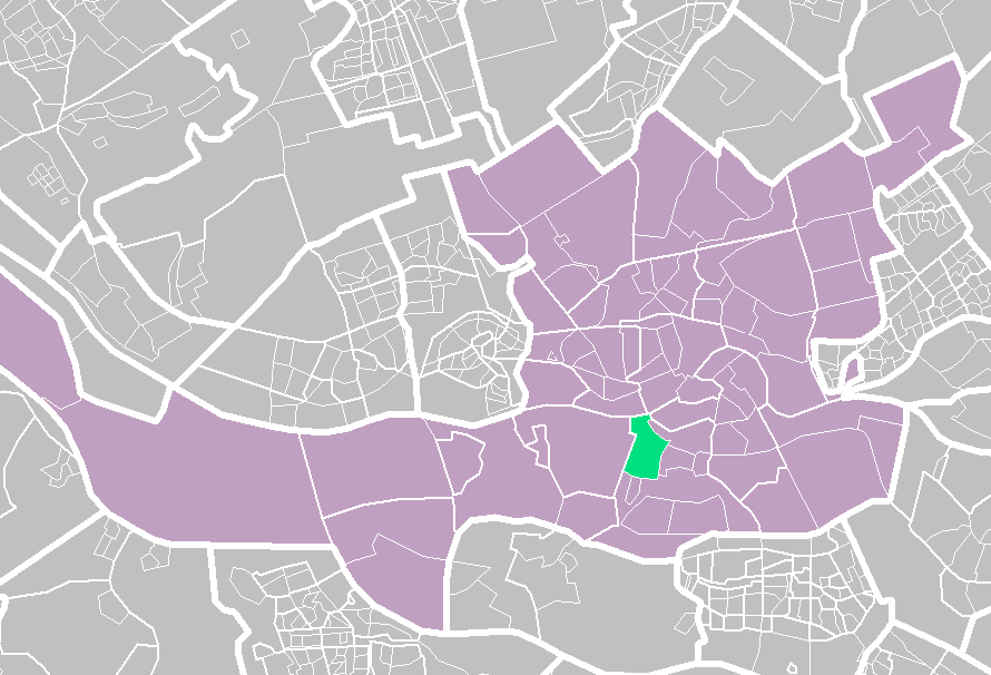 Rotterdam districts/neighboorhoods